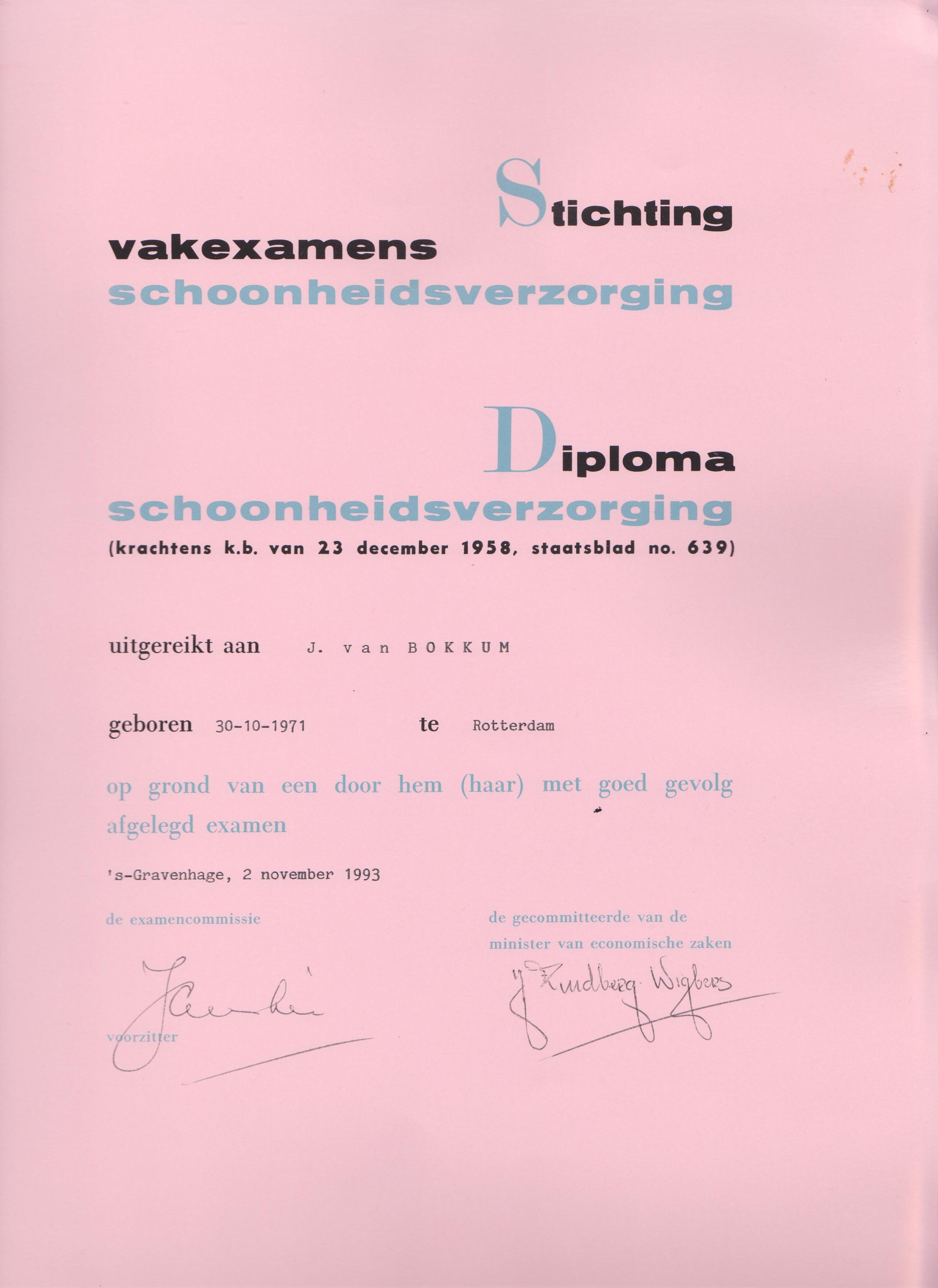 Stivas (Stichting Vakexamens Schoonheidsverzorging) diploma Schoonheidsverzorging op grond van een goed afgelegd examen Schoonheidsverzorging waarvan de opleiding gevolg werd op het instituut van Adry Hermans te Rotterdam